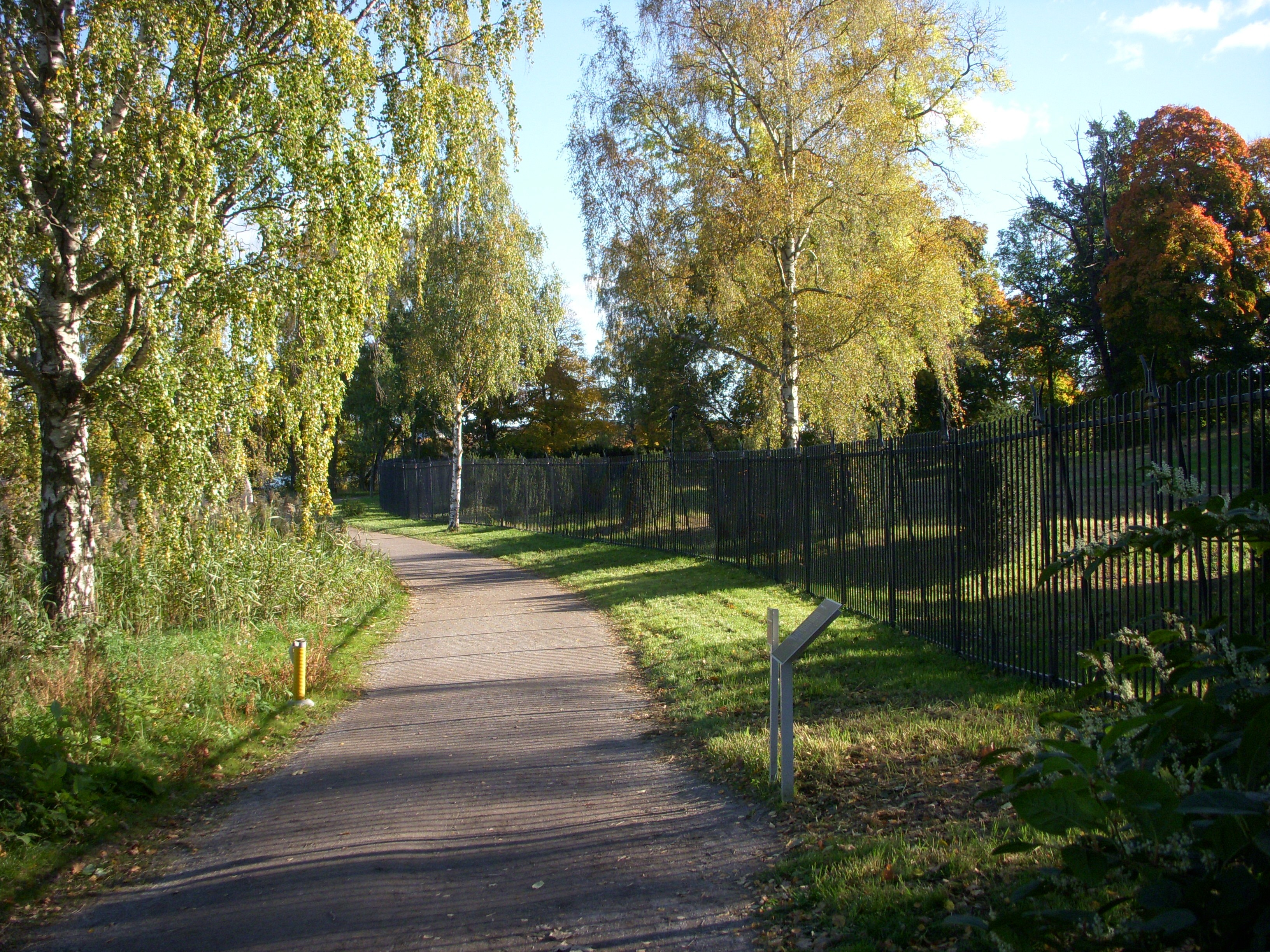 Promenadvägen mellan Haga slott och Brunnsviken